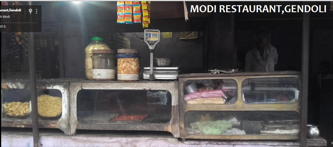 this is the original image of modi restaurant,gendoli.